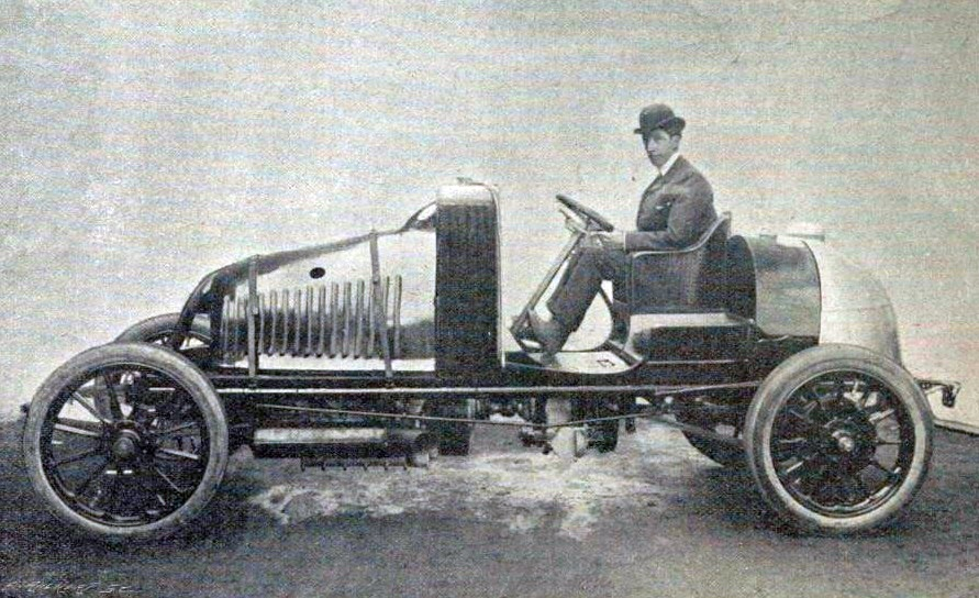 La Renault 60 hp de W. G. Brokaw (ici au volant), 17e avec Maurice Bernin de la Coupe Vanderbilt 1904 - La Vie au Grand Air du 29 septembre 1904, p.802